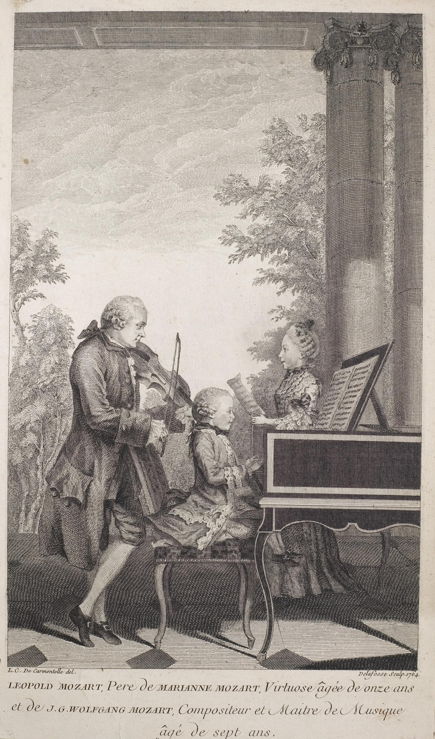 Grafik aus dem Klebeband Nr. 14 der Fürstlich Waldeckschen Hofbibliothek Arolsen Motiv: Leopold, Wolfgang Amadeus und Nannerl Mozart beim Musizieren